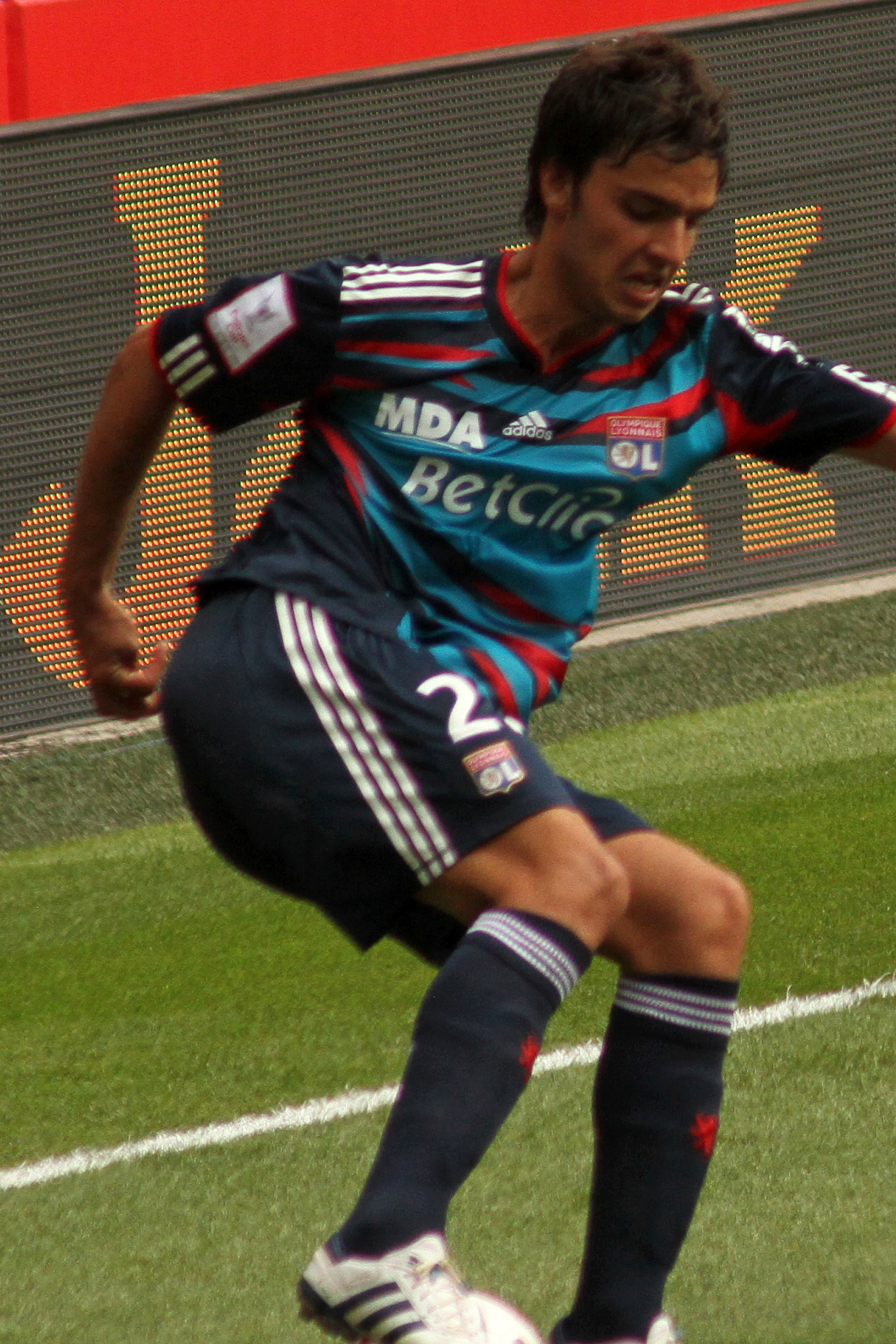 Clement Grenier